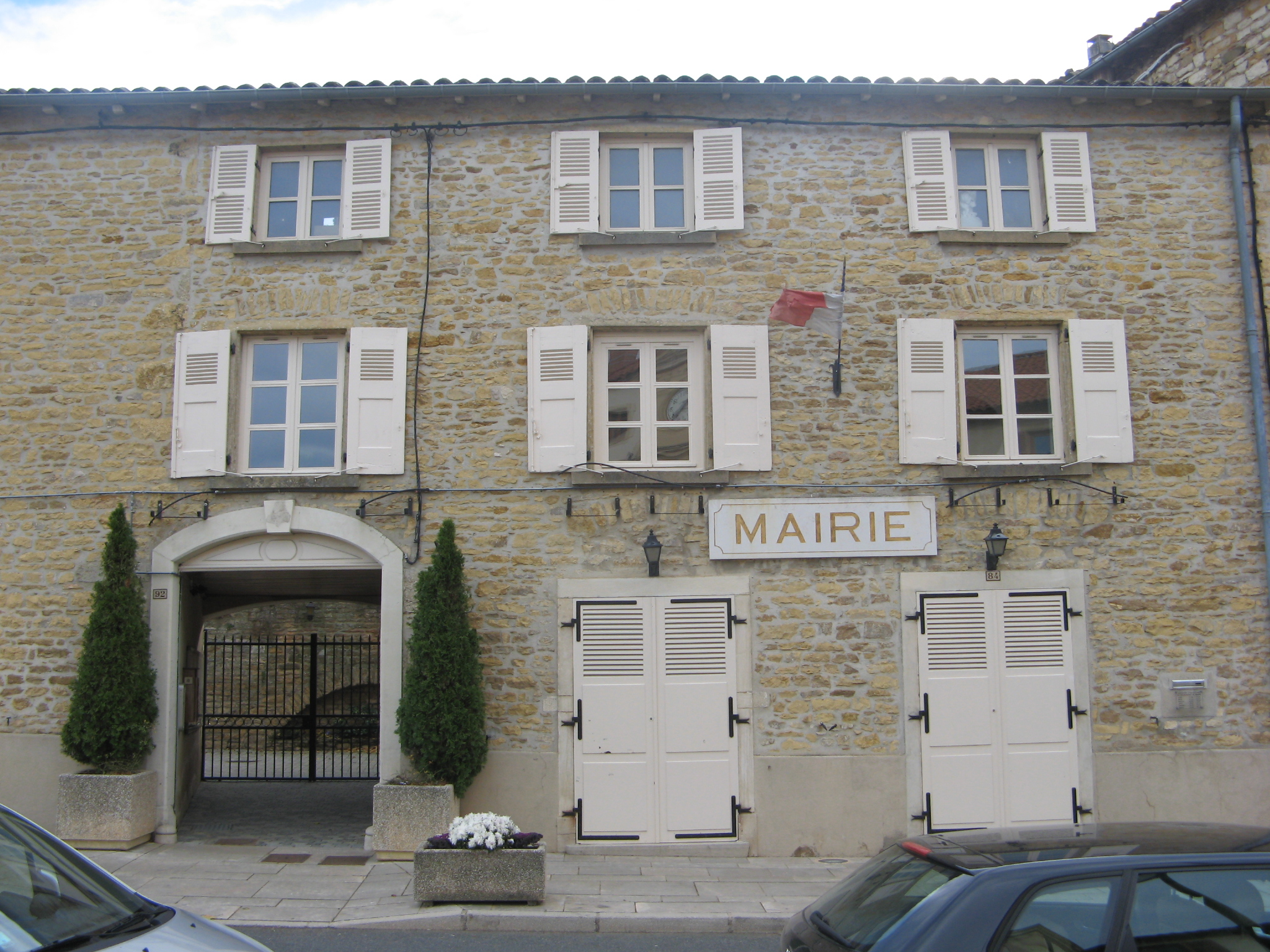 Vue de la mairie de Pommiers - Département du Rhône.